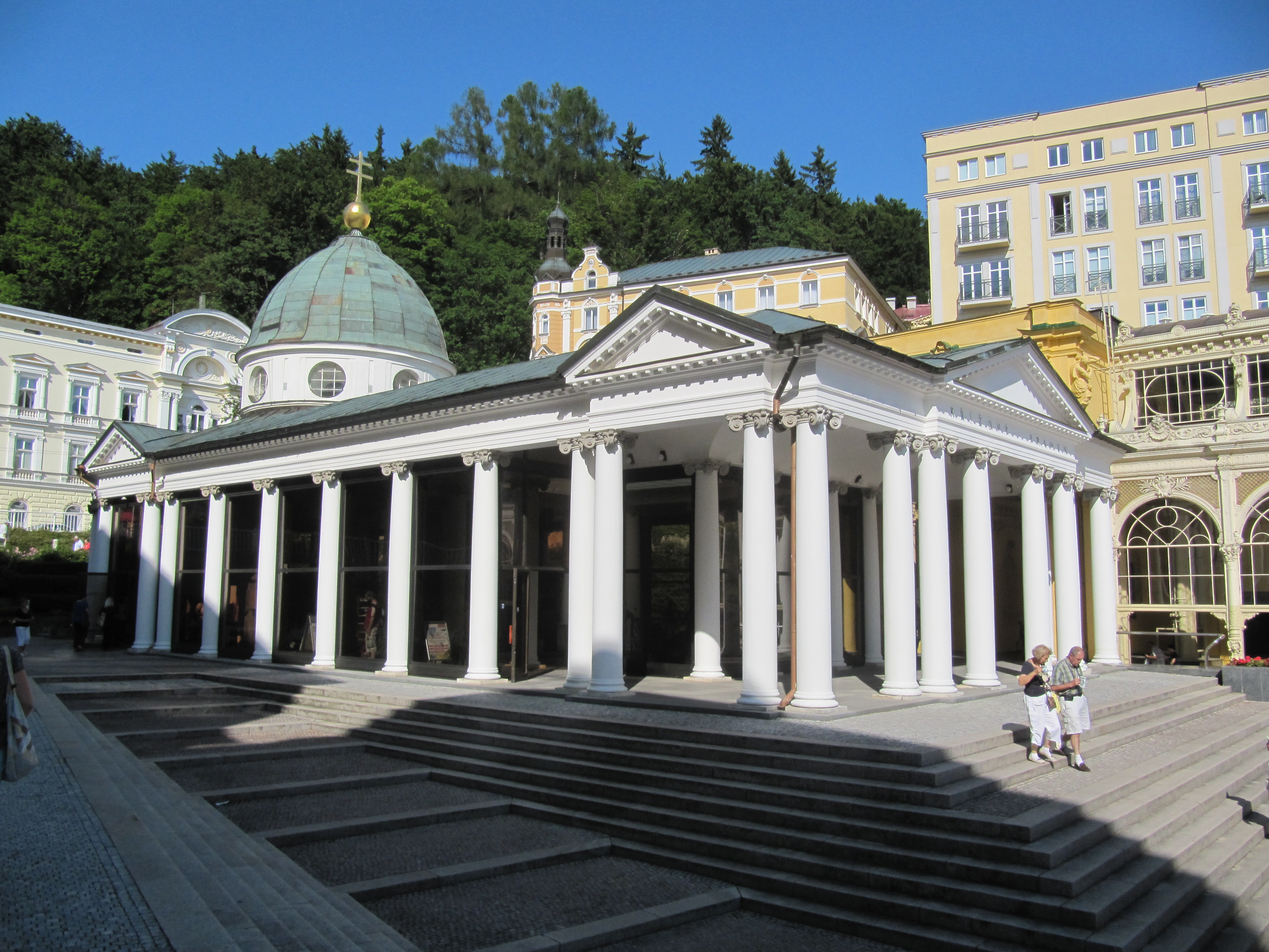 Mariánské Lázně, kolonáda Křížového pramane